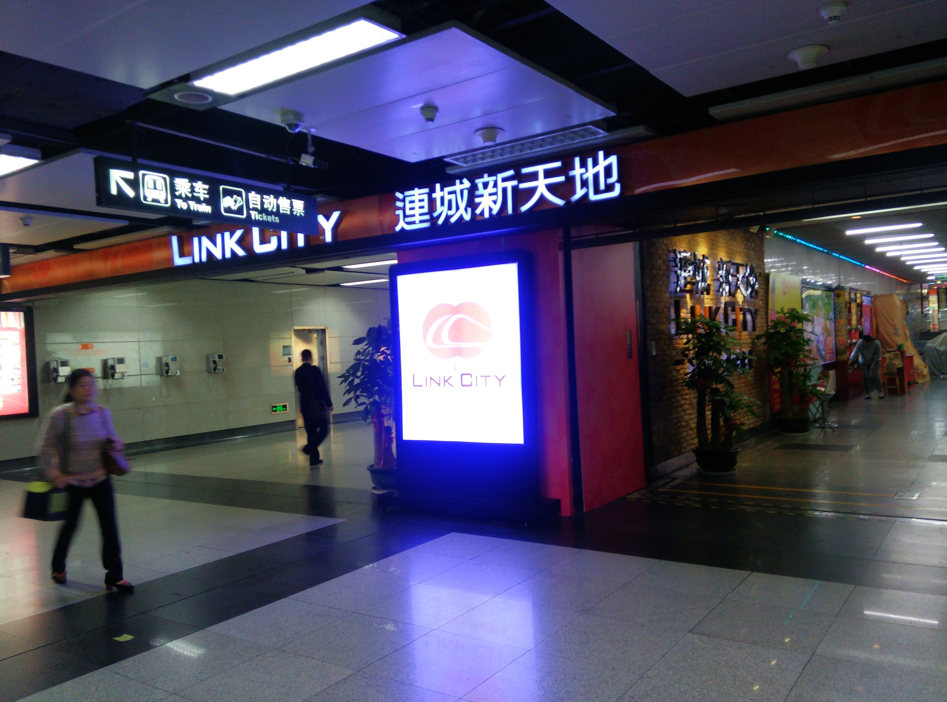 Shenzhen Link City